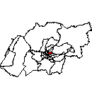 mapa del distrito de paucarpata, Arequipa